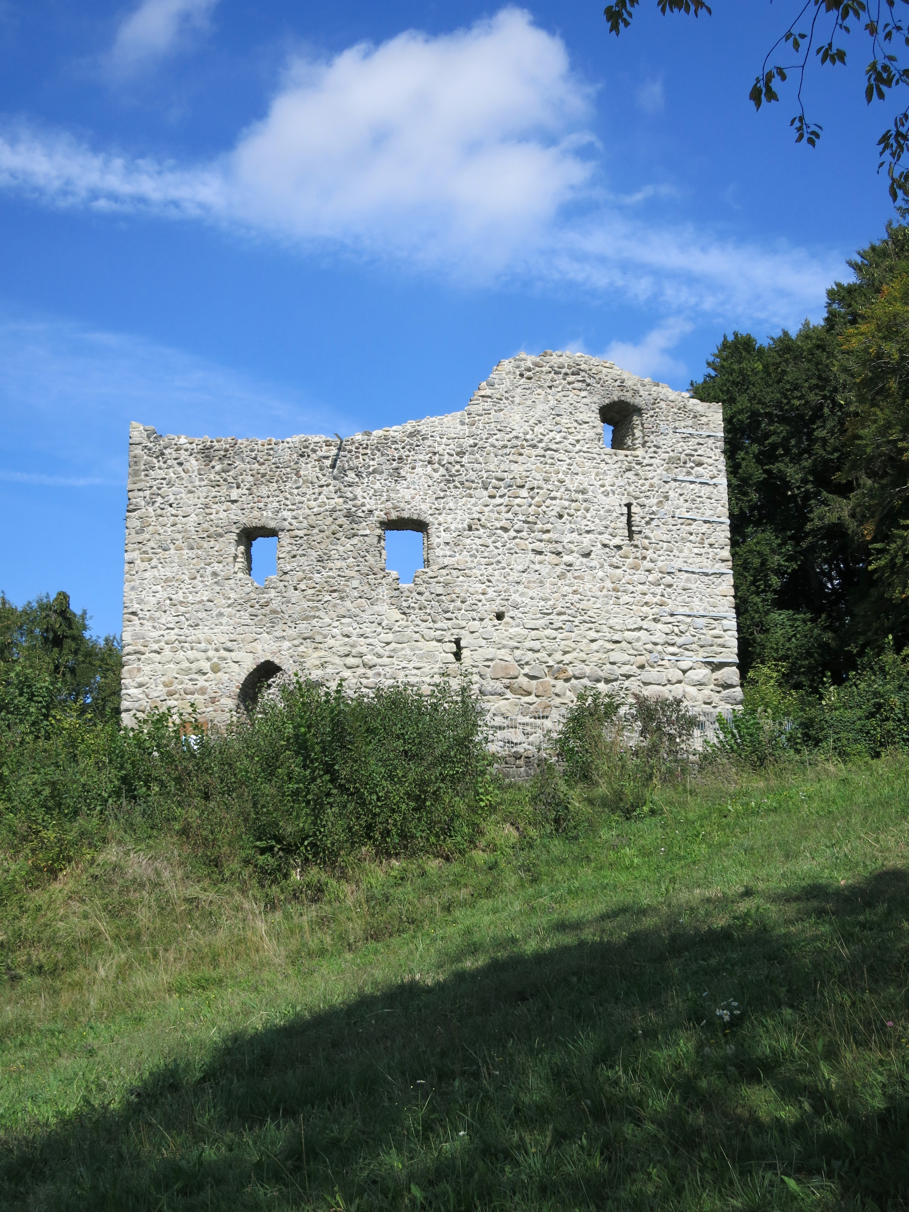 Burgruine Lieli